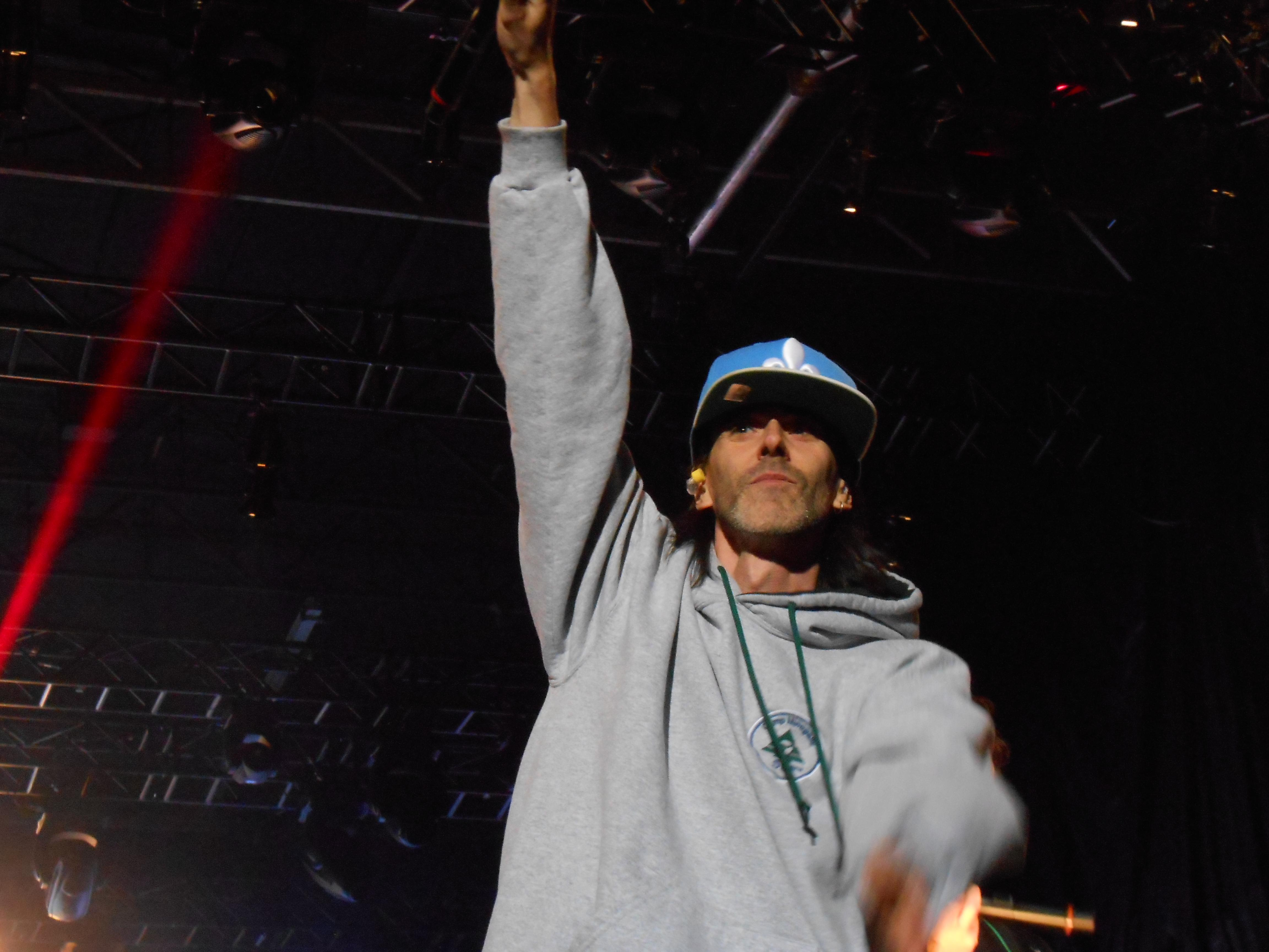 Pour célébrer les 25 ans des FrancoFolies de Montréal, le président, Alain Simard, a eu l'idée de réunir 25 artistes (ou groupes) qui chanteraient chacun LA chanson de leur répertoire la plus connue du public. Le spectacle a eu lieu lundi le 17 juin 2013 à partir de 21:00 à la place des Festivals. Dans l'ordre, sont apparus : Karim Ouellet, Ariane Moffatt, Richard Séguin, Corneille, Lisa LeBlanc, Daniel Lavoie, Mara Tremblay, Mes Aïeux, Luc De Larochelière, Dumas, Isabelle Boulay, Yann Perreau, Laurence Jalbert, Stefie Shock, Michel Rivard, Pierre Lapointe, Dan Bigras, Paul Piché, Vincent Vallières, Les Respectables, Damien Robitaille, Loco Locass, Daniel Boucher, Marjo et Éric Lapointe.